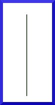 توضيح لمركبات الضلع أ في المكعب عند دورانه -1